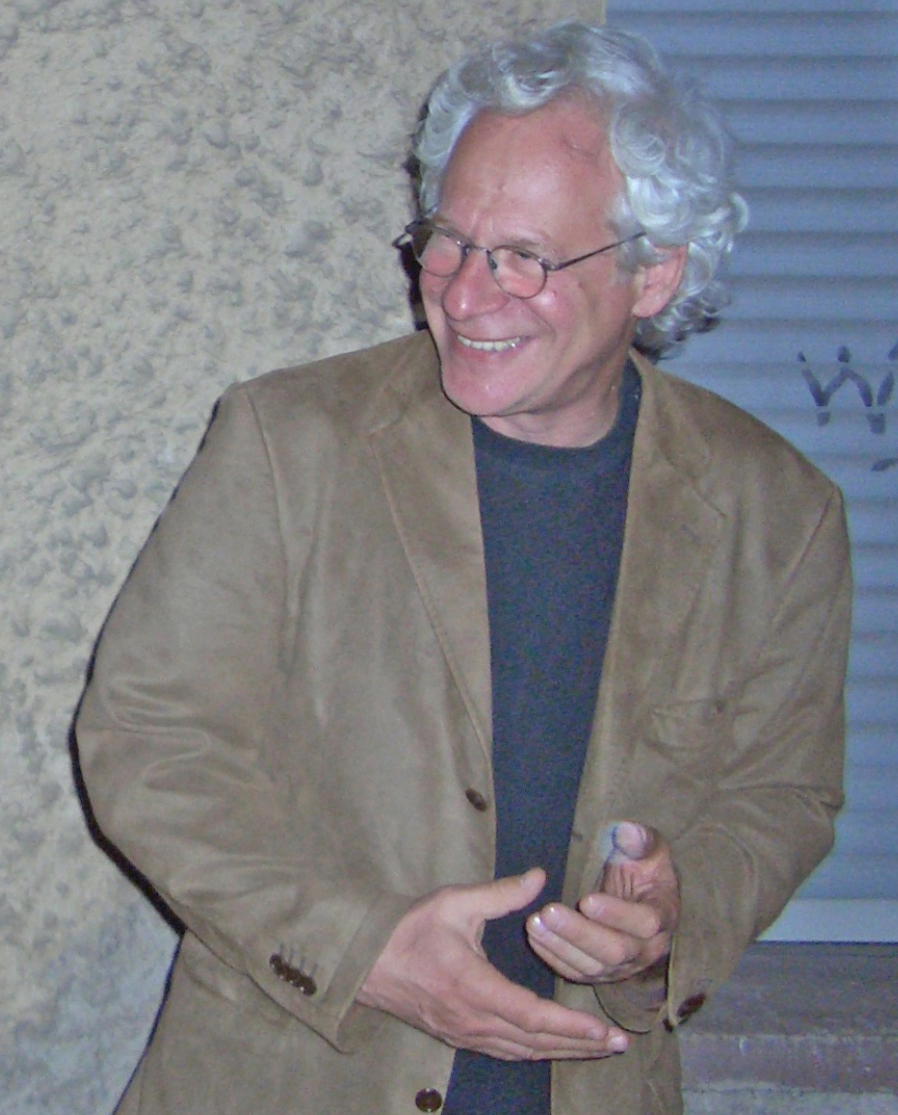 Dreharbeiten zu "Meine schöne Nachbarin"